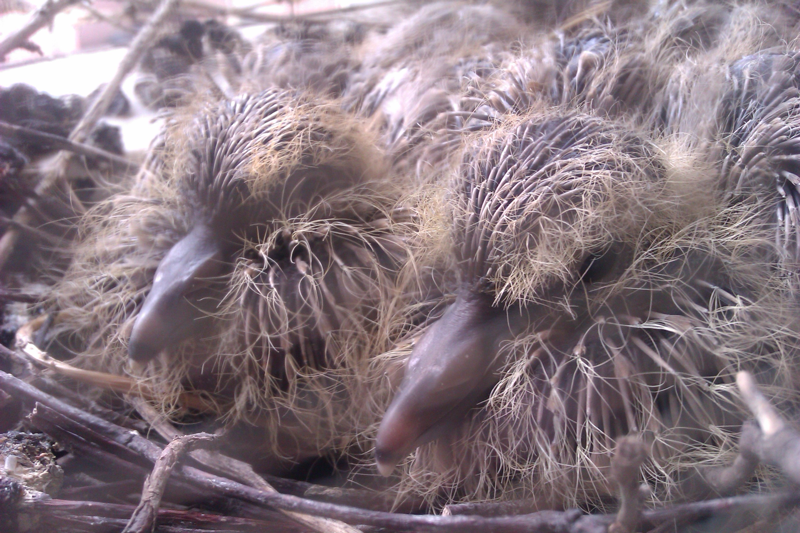 twee turkse torteduiven jongen